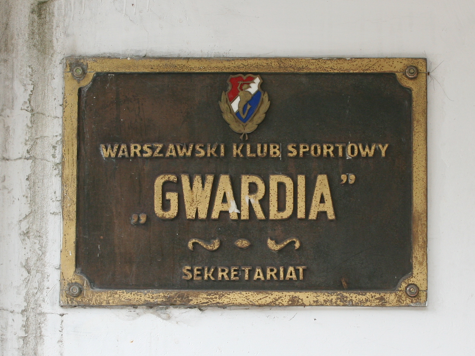 Gwardia Warszawa - wejscie do sekretariatu